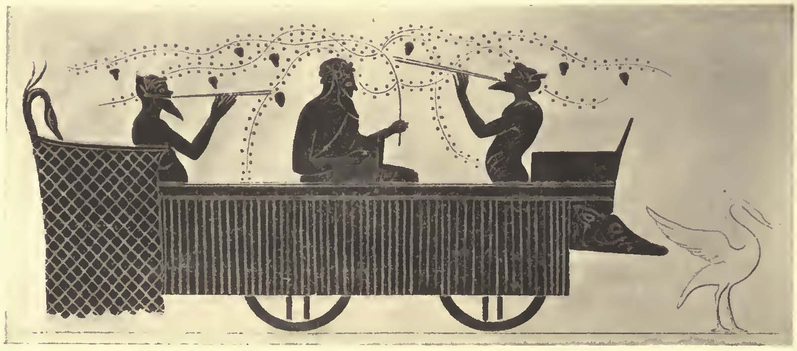 Attischer Skyphos aus Akrai in Sizilien, London, British Museum B 79. – Schemazeichnung des Vasenbilds. Schiffskarrenprozession während der Großen Dionysien. Ausschnitt: Schiffskarren mit der Holzstatue des sitzenden Dionysos Eleuthereus.